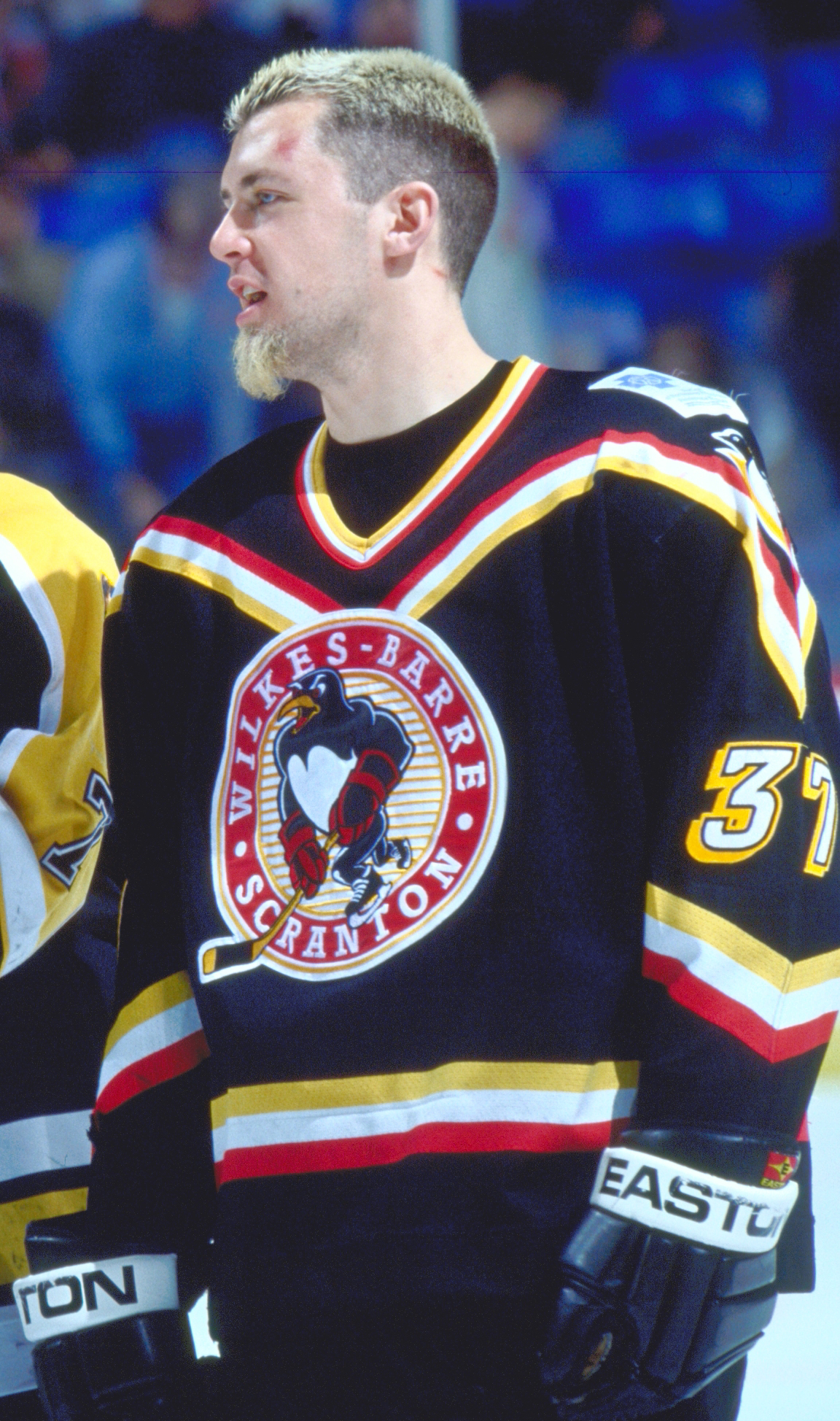 ahlstar0240